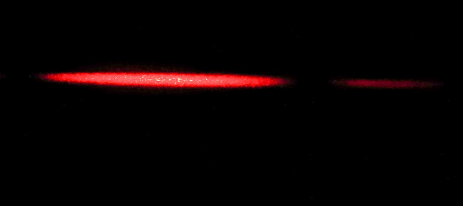 Láser difractado usando una sola rendija. Foto tomada en el laboratorio de óptica de la facultad de ciencias de la unam.